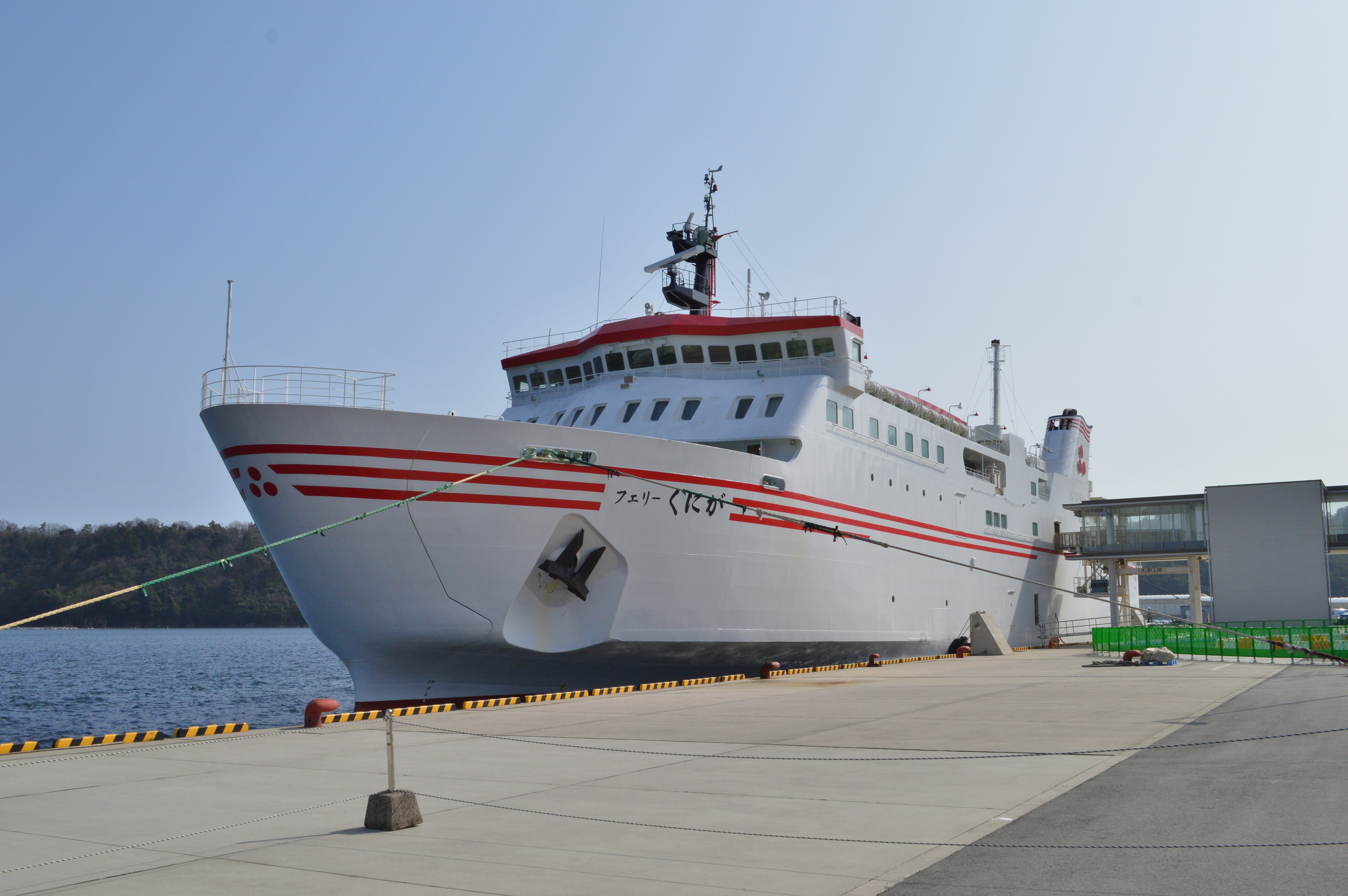 フェリーくにが (西郷港にて)